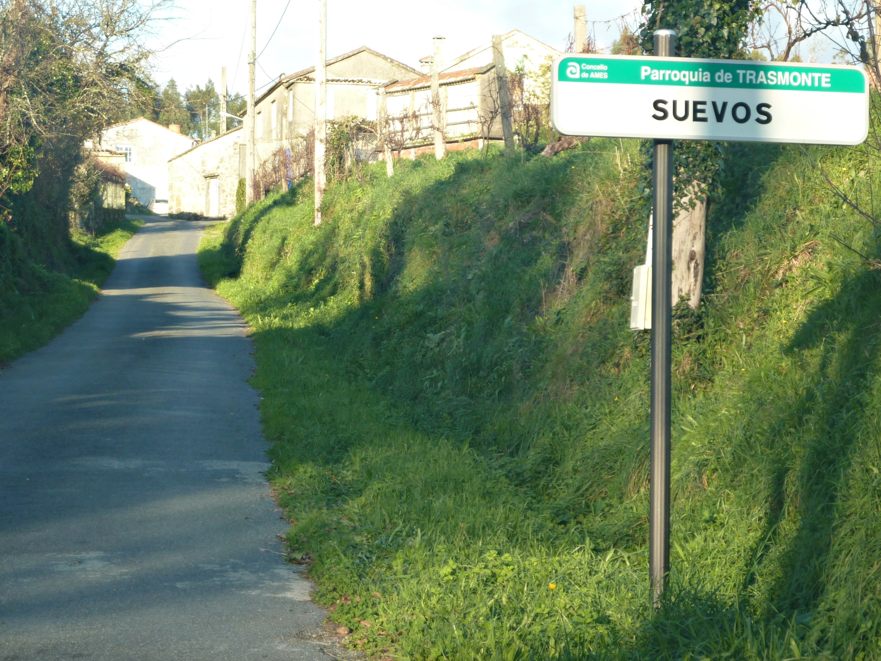 Suevos, Trasmonte, Ames.